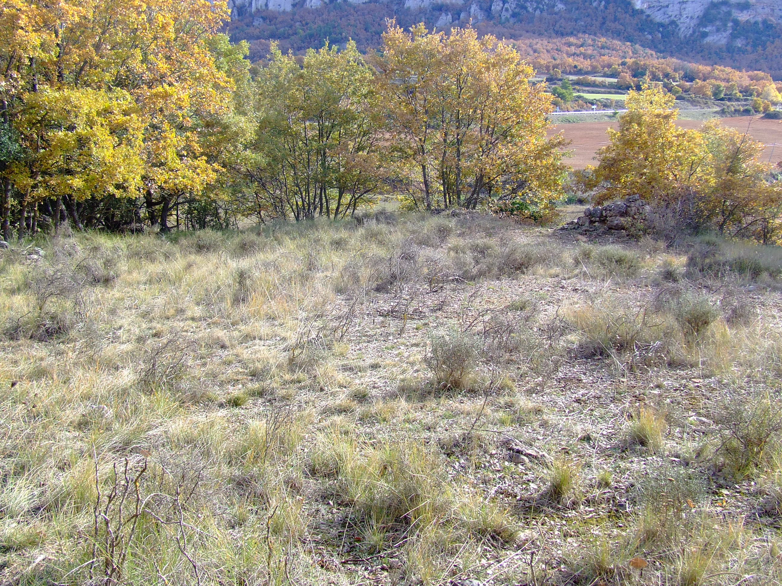 Lloc on se celebrava l'aplec de Sant Gili de Móra. Al fons, les restes de l'església.